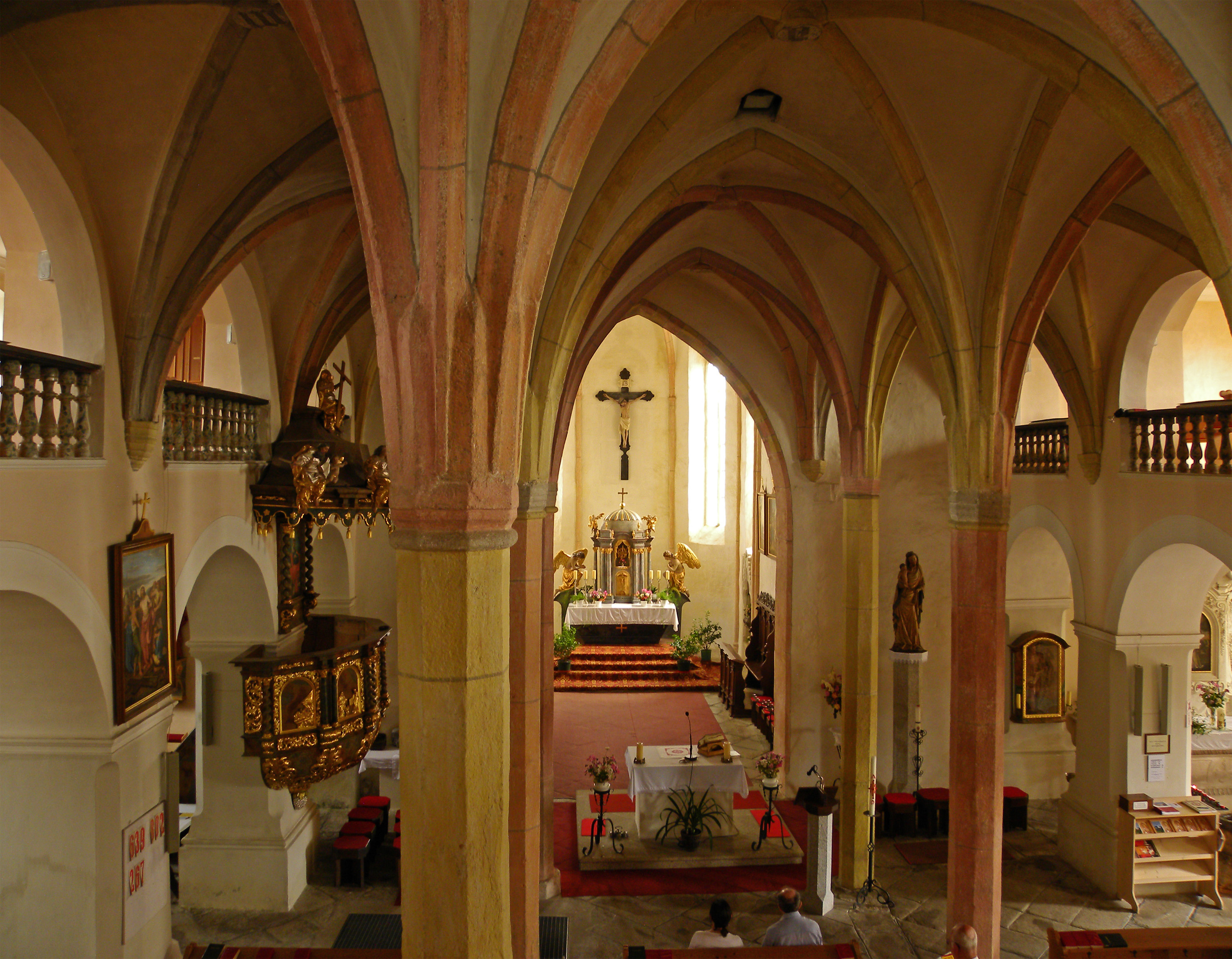 Kath. Pfarrkirche Mariä Geburt und Friedhof